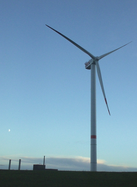 Repower 5M